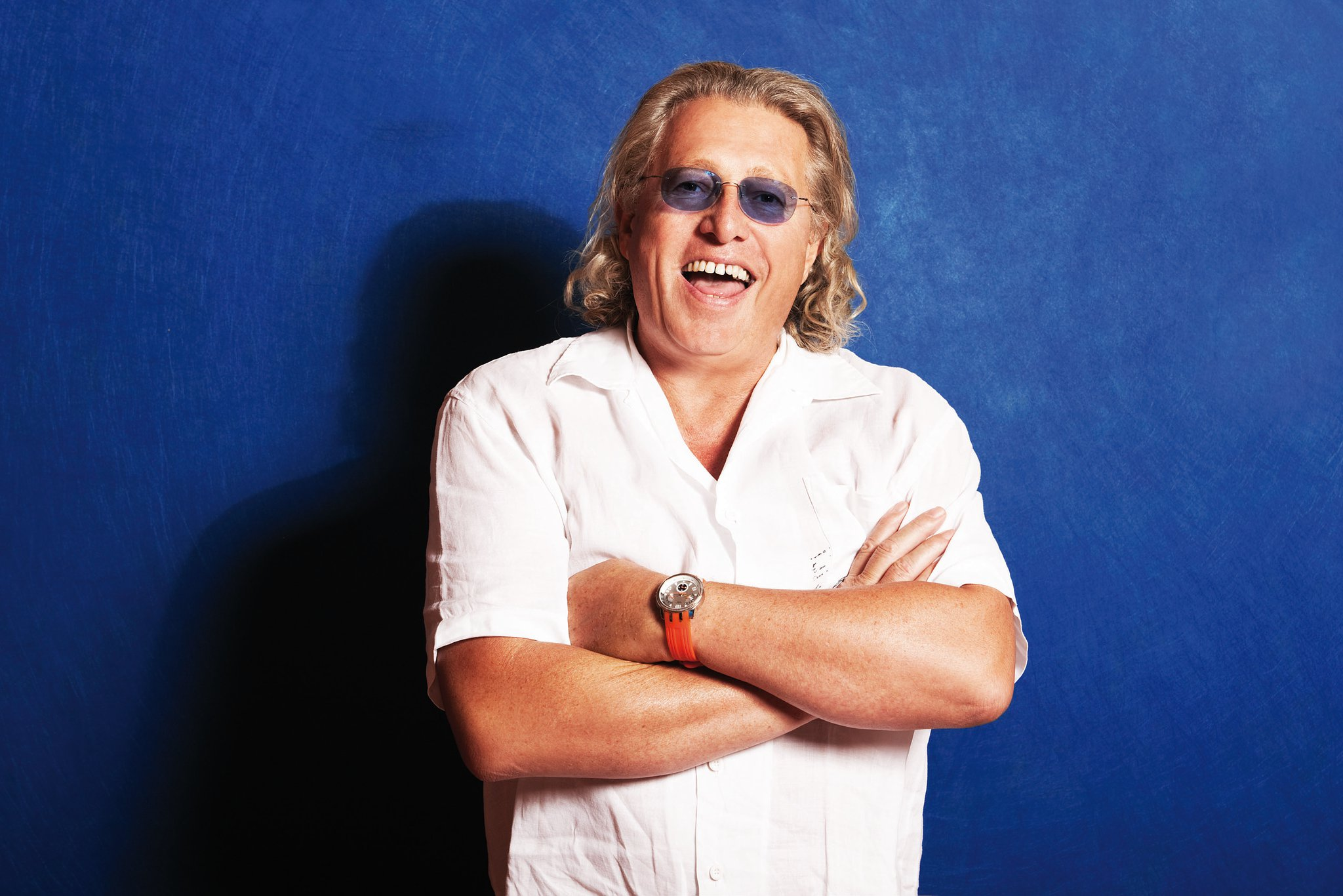 DJ storico radio libere,musicista